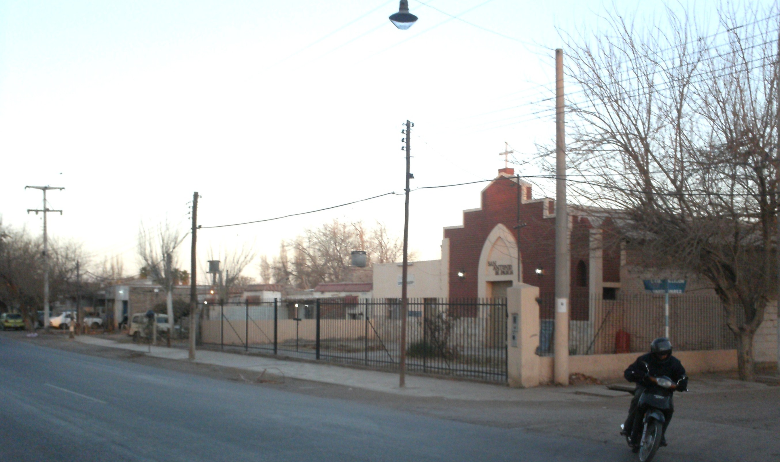 La iglesia católica de Altos de Sierra